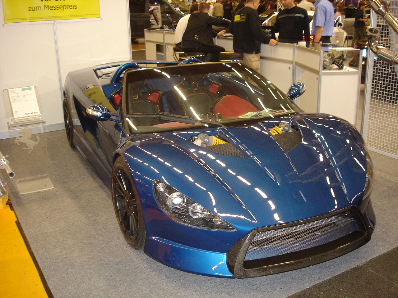 Attack K1